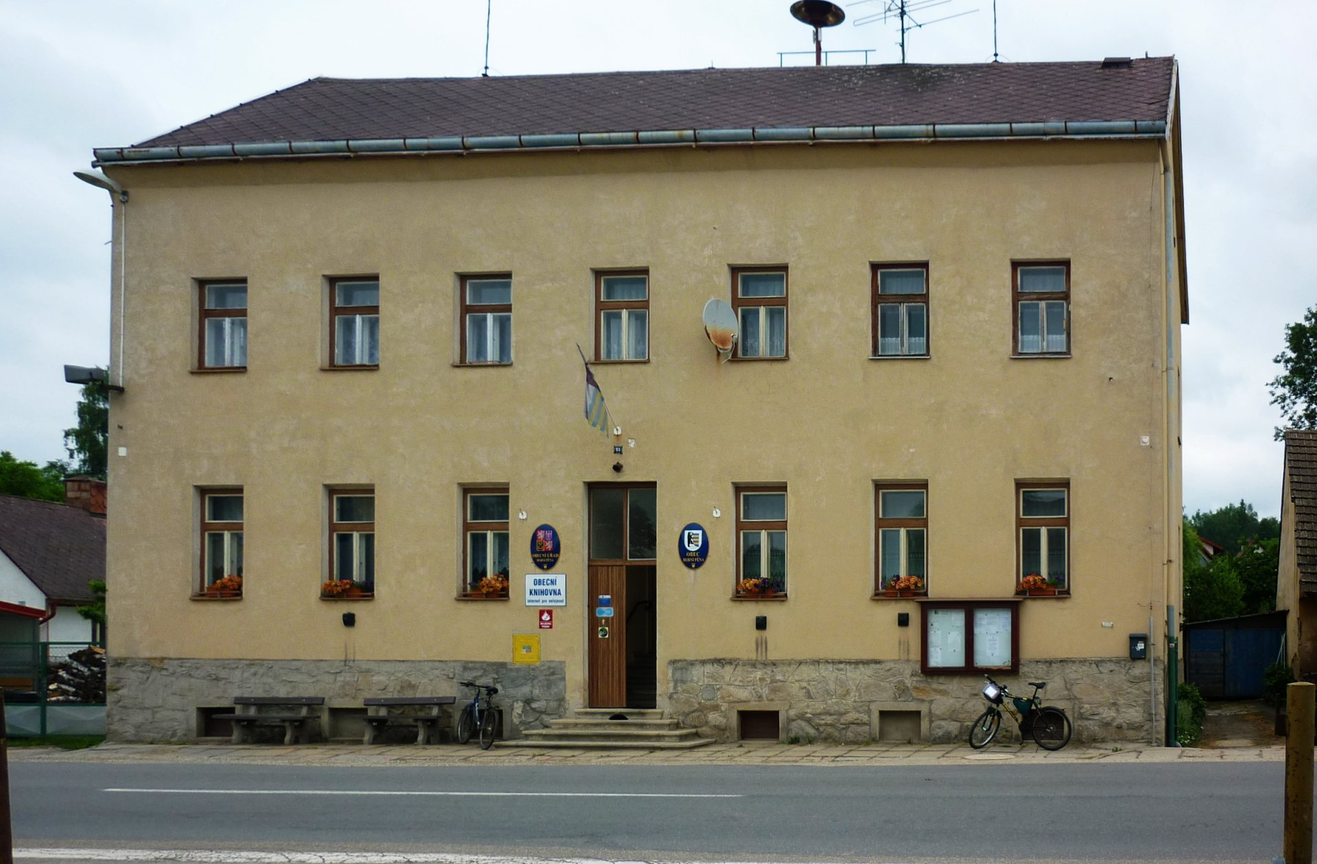 Horní Pěna - obecní úřad